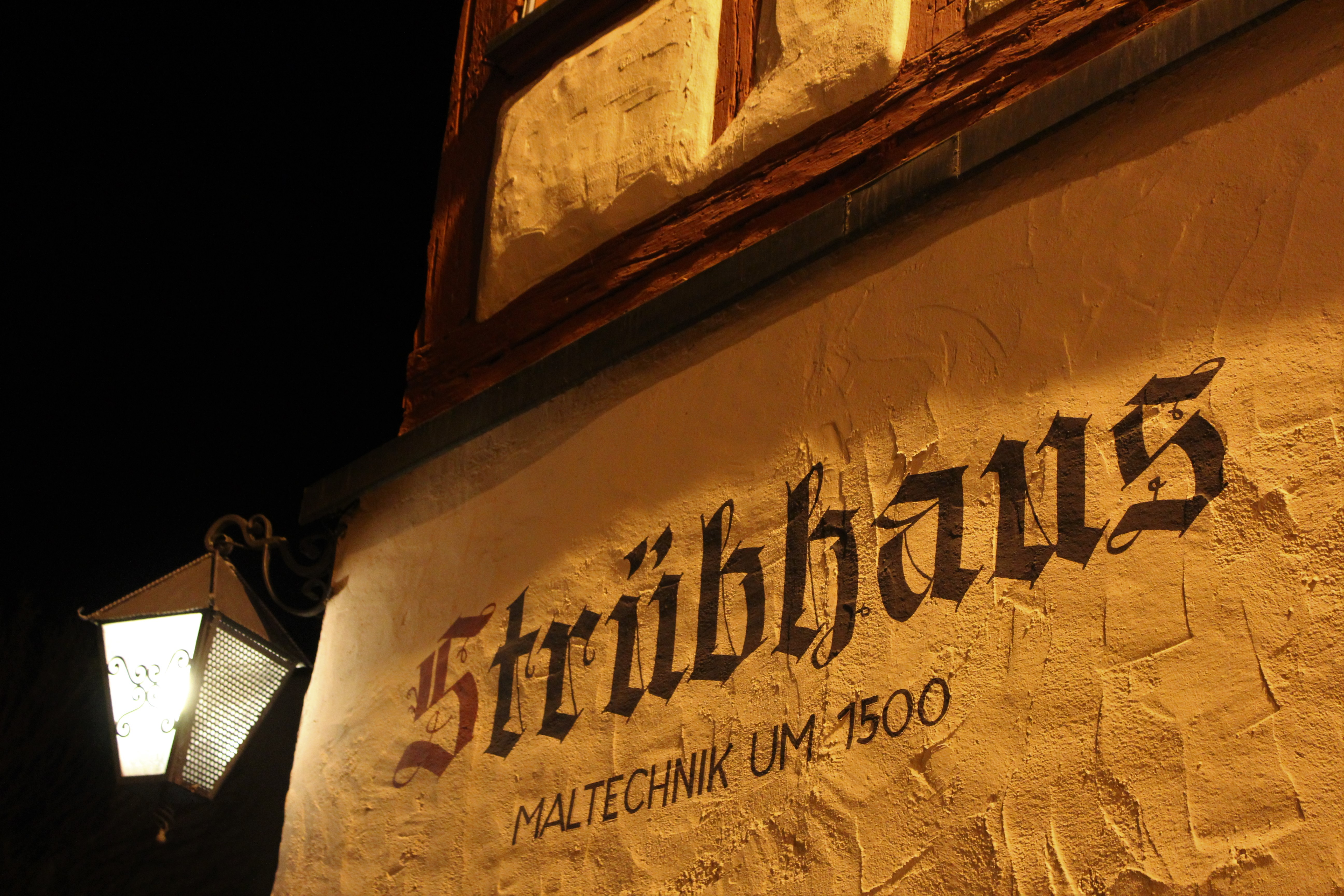 Strübhaus Veringenstadt. Das Strübhaus (vermutlich um 1360) ist das originale Wohnhaus mit Werkstätte der Künstlerfamilie Strüb und bildet einen Blickfang im Altstadtensemble von Veringenstadt. Mitglieder der Familie Strüb wohnten von 1360 bis 1540 in Veringenstadt am Fuße des Kirchbergs. Das Strübhaus war Wohnhaus und Werkstatt der Künstlerfamilie Strüb. Zur eigentlichen Künstlerfamilie werden gezählt: Peter Strüb der Ältere sowie dessen Söhne Jakob Strüb Hans Strüb Peter Strüb der Jüngere Die Künstler-Werkstatt der Familie wird auch unter dem Namen „Meister von Veringen“ geführt, während die Brüder Hans und Jakob Strüb auch unter dem Namen „Meister von Sigmaringen“ bekannt sind. Ihre Werke sind in Kirchen der näheren Umgebung sowie in- und ausländischen Museen zu sehen, unter anderen in der Sammlung Würth, ferner in Mannheim, Berlin, Madrid und Warschau. Altäre der Meister von Sigmaringen-Veringen stehen beispielsweise in Sigmaringen, Inzigkofen, Heudorf und Krakow. Heute beherbergt das Haus ein Museum mittelalterlicher Malkunst, in dem die Arbeitsweise der Malkunst der Künstlerfamilie Strüb vorgestellt wird: die Besucher erfahren die einzelnen Schritte von der ersten Rohzeichnung auf dem weiß grundierten Fichtenbrett bis hin zum Auftragen der edelsten Mineralfarben in der Werkstatt Strüb. Die Künstlerfamilie Strüb hatte in der Zeit von 1500 bis 1535 in 30 Aufträgen insgesamt 24 Flügelaltäre, zwei Schreine, vier Einzelbilder und weitere verschiedene Fragmente hergestellt. Viele Bilder und Schnitzwerke der Familie Strüb sind in der Ausstellung als Foto-Reproduktionen dargestellt und geben einen Überblick über ihr Schaffen der Renaissance - zum Ende des Mittelallters und zu Beginn der Neuzeit. Außerdem kann im 1. Stock eine sehenswerte alte Küche mit gemauertem Herd besichtigt werden. In weiteren Räumen wird der Werdegang des alten Fachwerkhauses in den vergangenen 40 Jahren gezeigt.